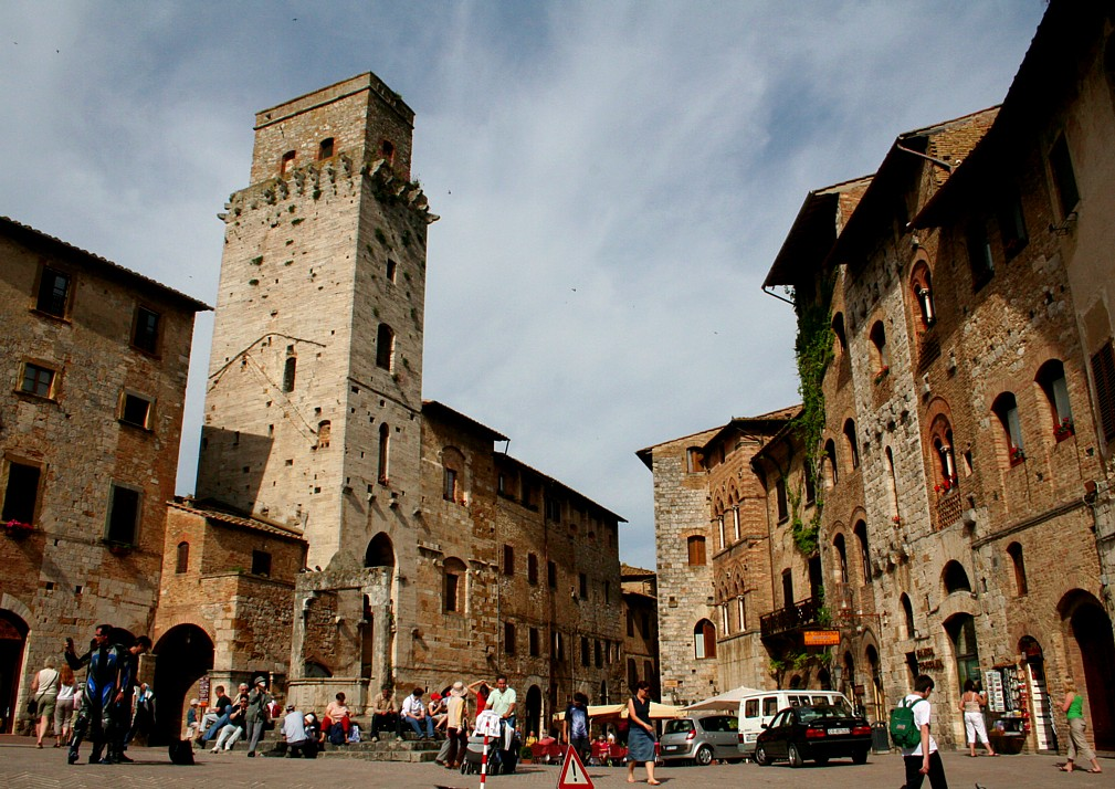 Piazza Cisterna, the main square in San Gimignano, Italy.